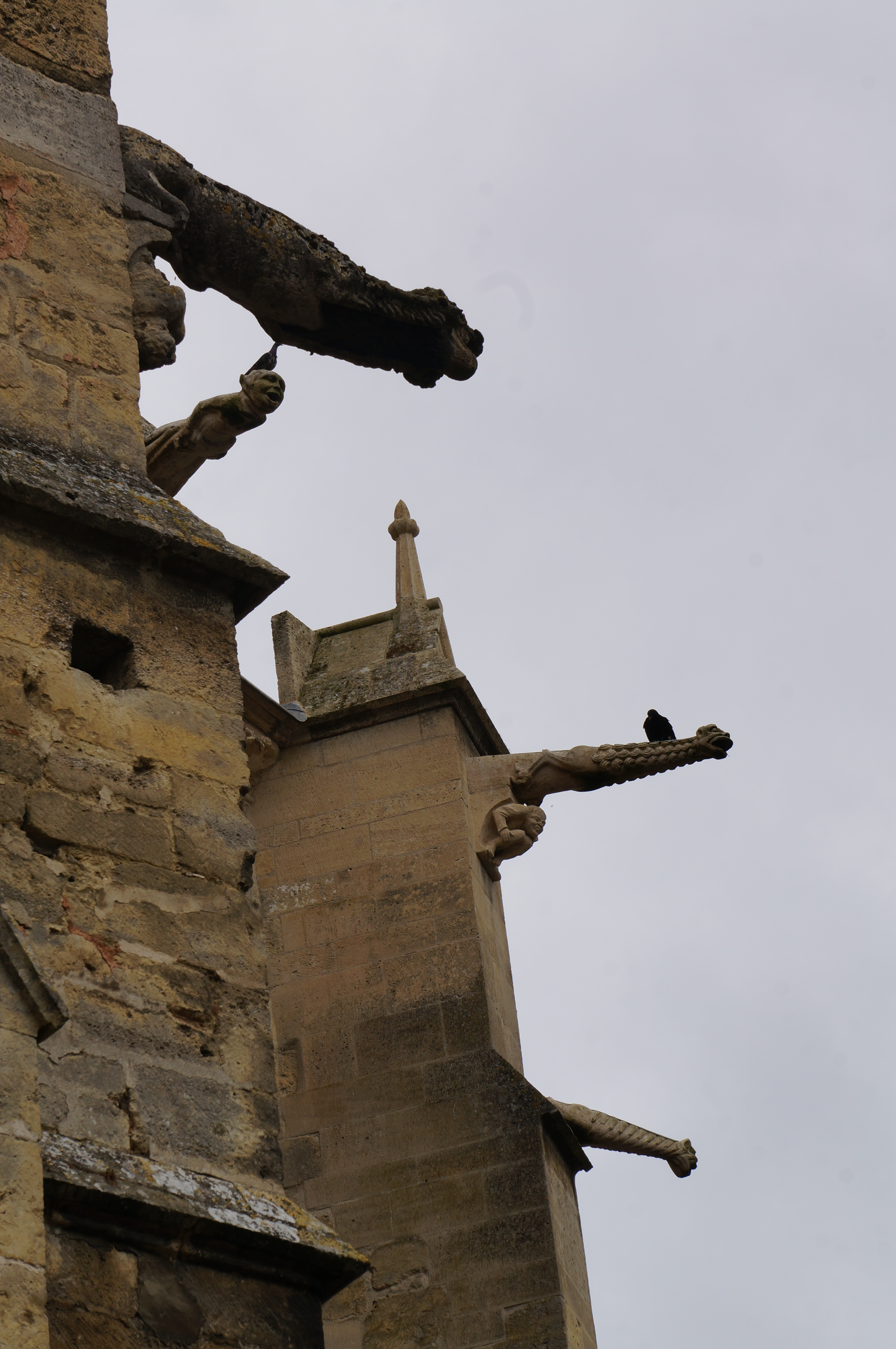 Quelques gargouilles.